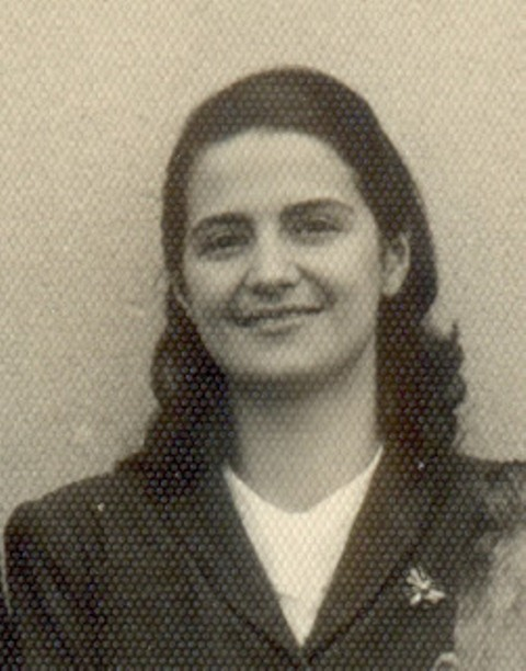 Foto pessoal de Marília Chaves Peixoto